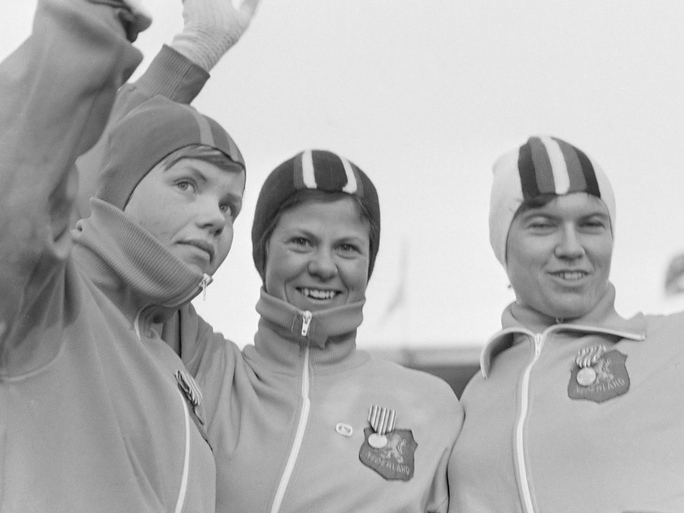 Europese kampioenschappen schaatsen voor dames Heerenveen Rieneke Demming, Ans Schut, Stien Kaiser 3000m 1 februari 1970